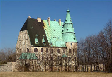 Villa Ohrdruf, Thuringia Germany